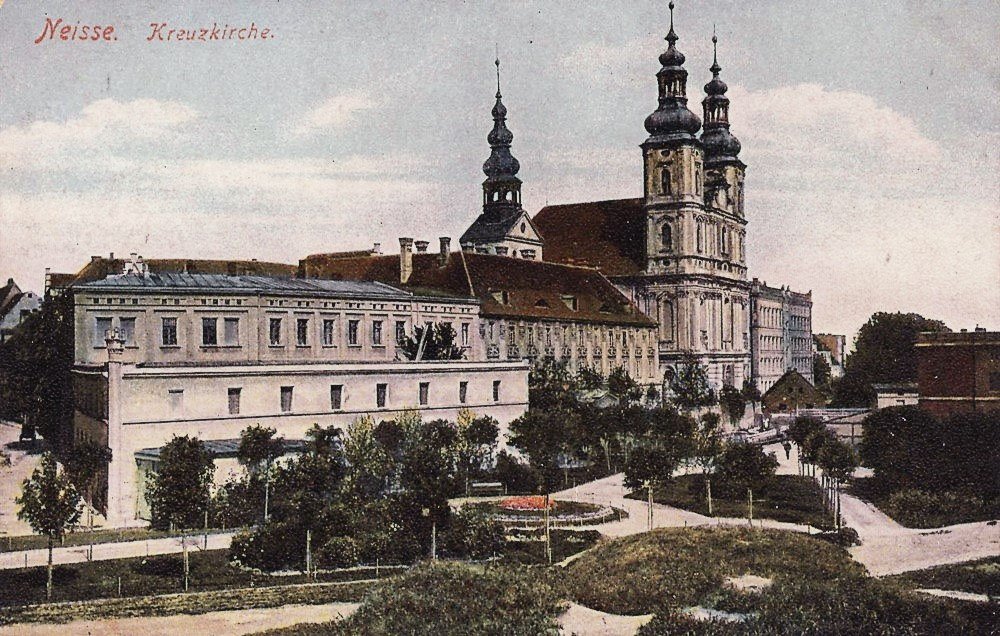 Kościół św. Piotra i Pawła w Nysie. Pocztówka z początku XX wieku